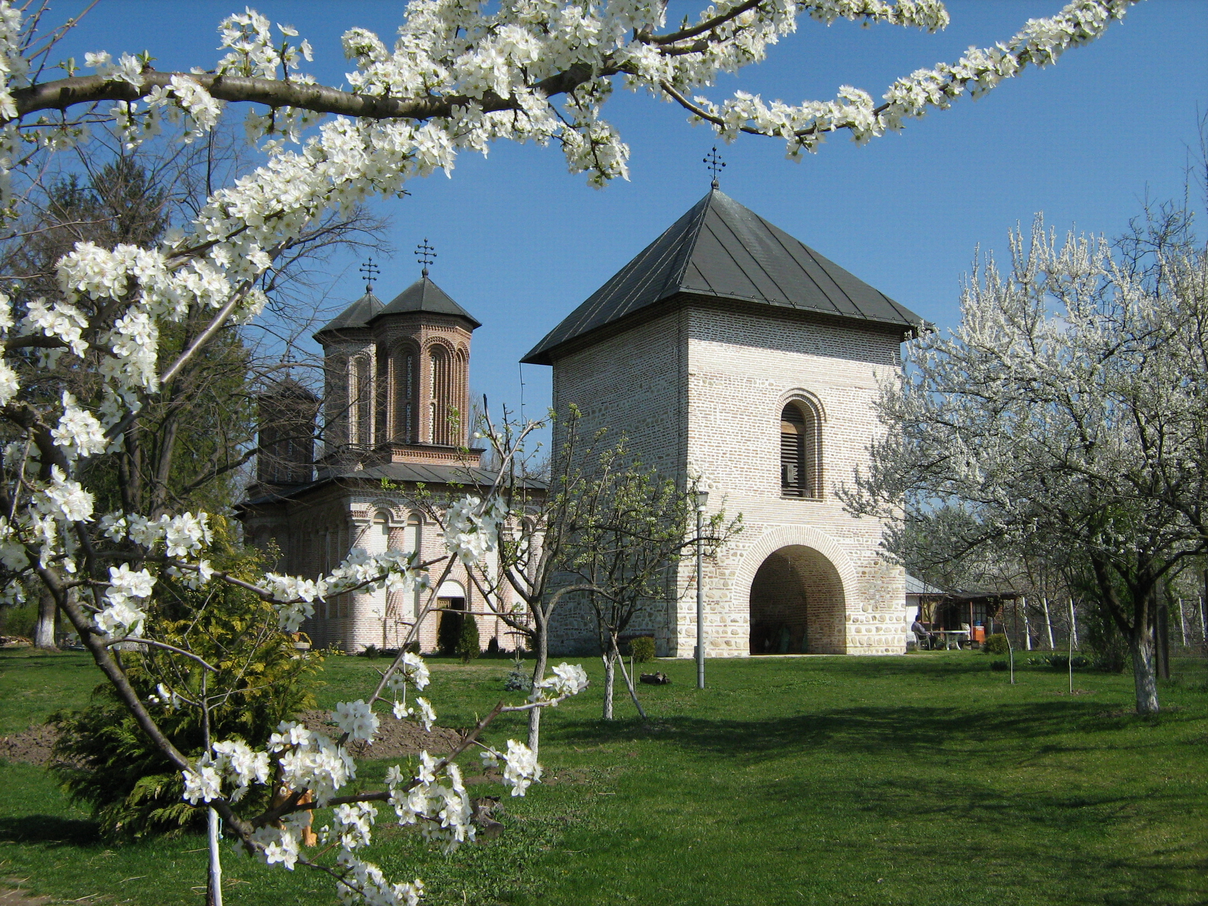 Ansamblul fostei mănăstiri Snagov - vedere din vest